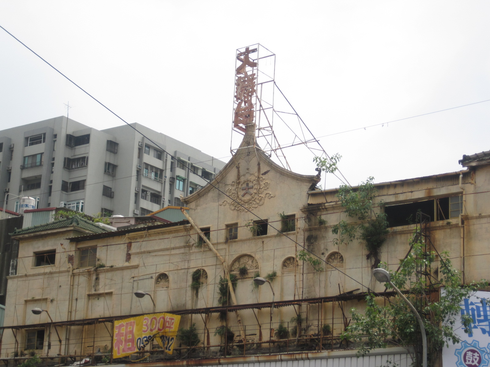 高雄大舞台戲院。圖中的山牆已經在2011年10月遭到拆毀。